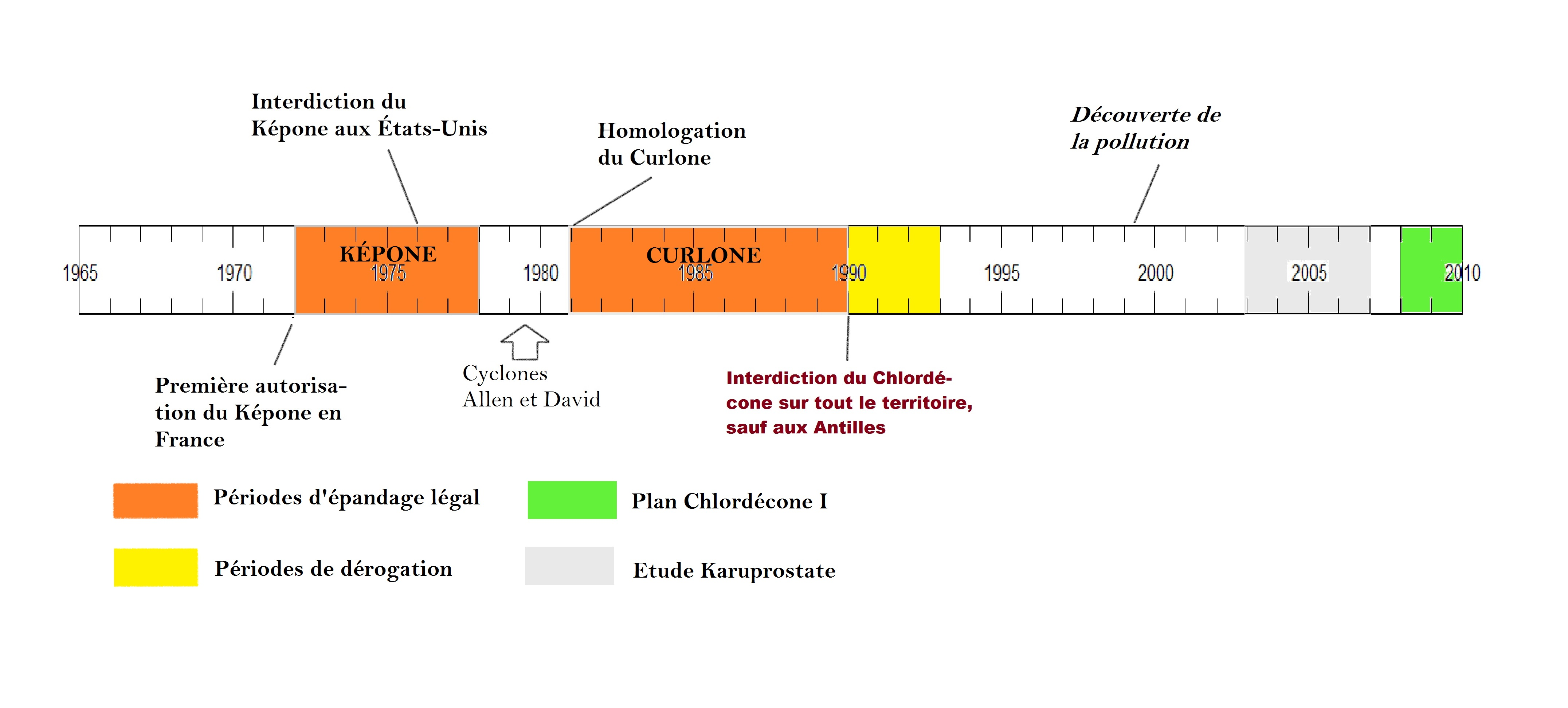 Cette frise retrace les différents événements qui ont marqué l'hitoire l'utilisation de la chlordécone aux Antilles, et son statut légal en France